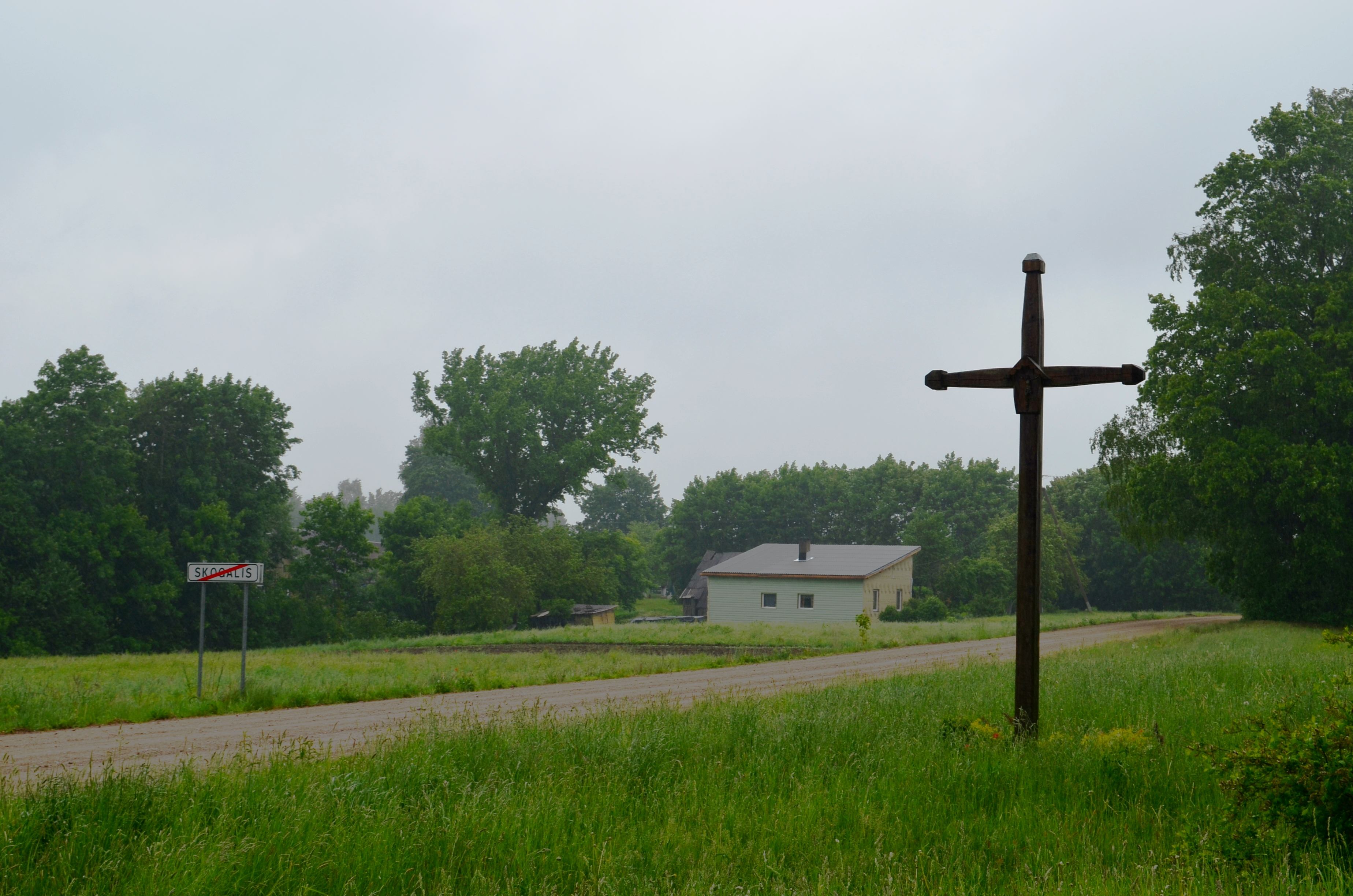 Kryžius Skogalyje, Kelmės r.